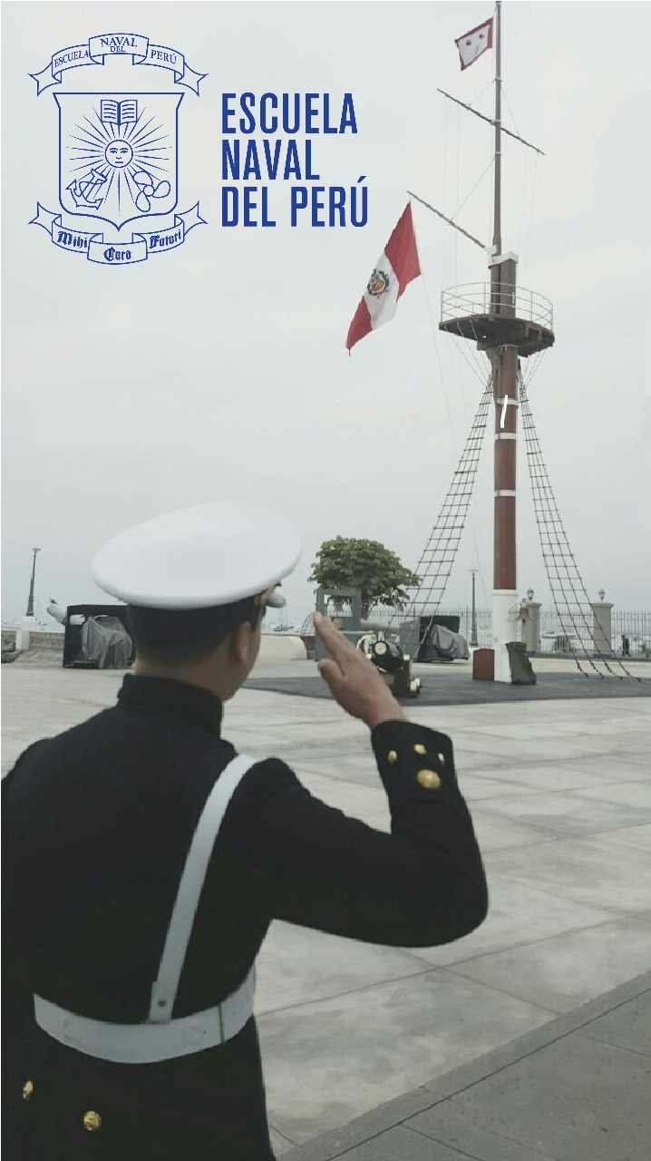 Cadete Escuela Naval del Perú